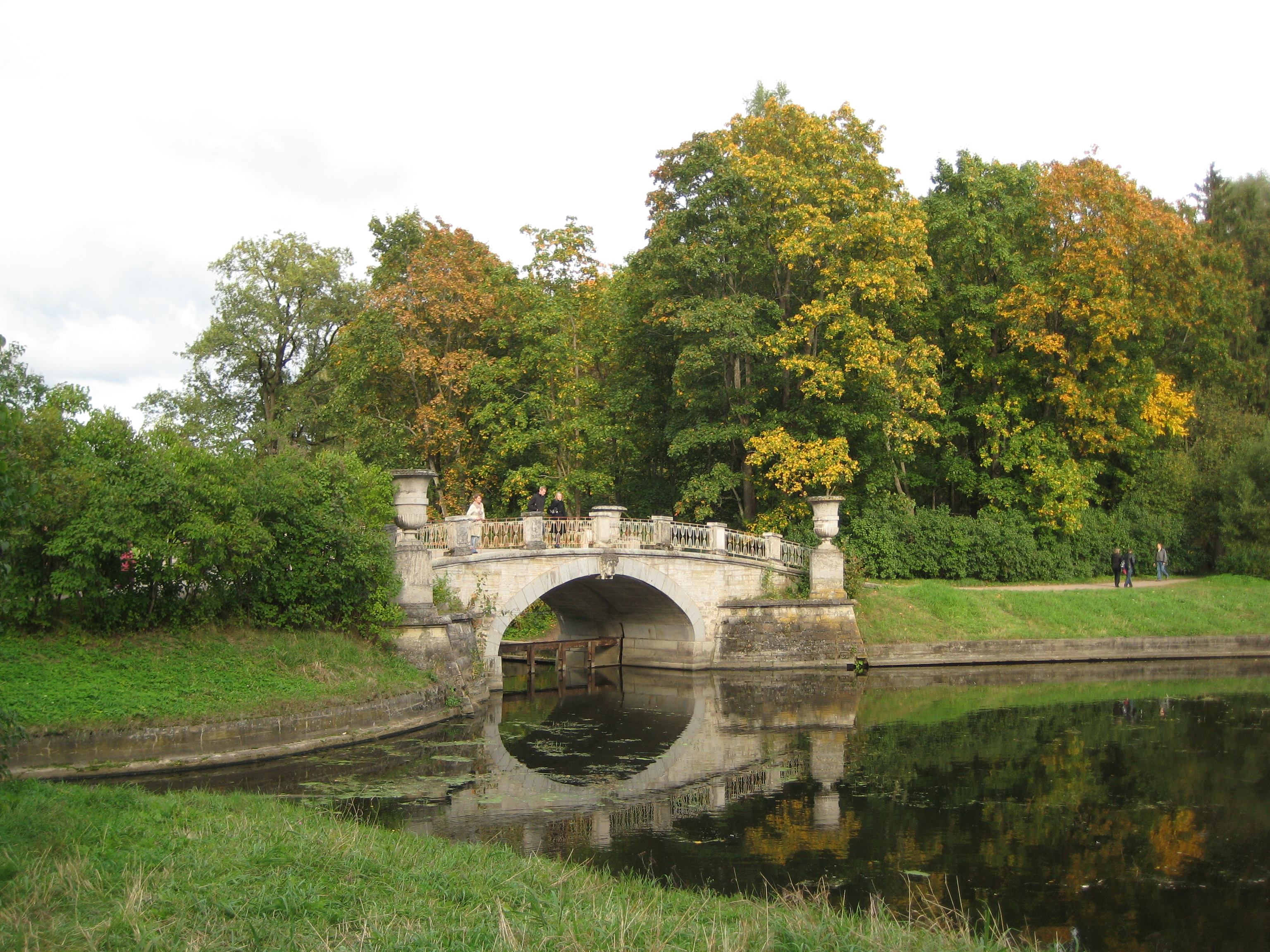 Павловск. Павловский парк. Висконтиев мост.